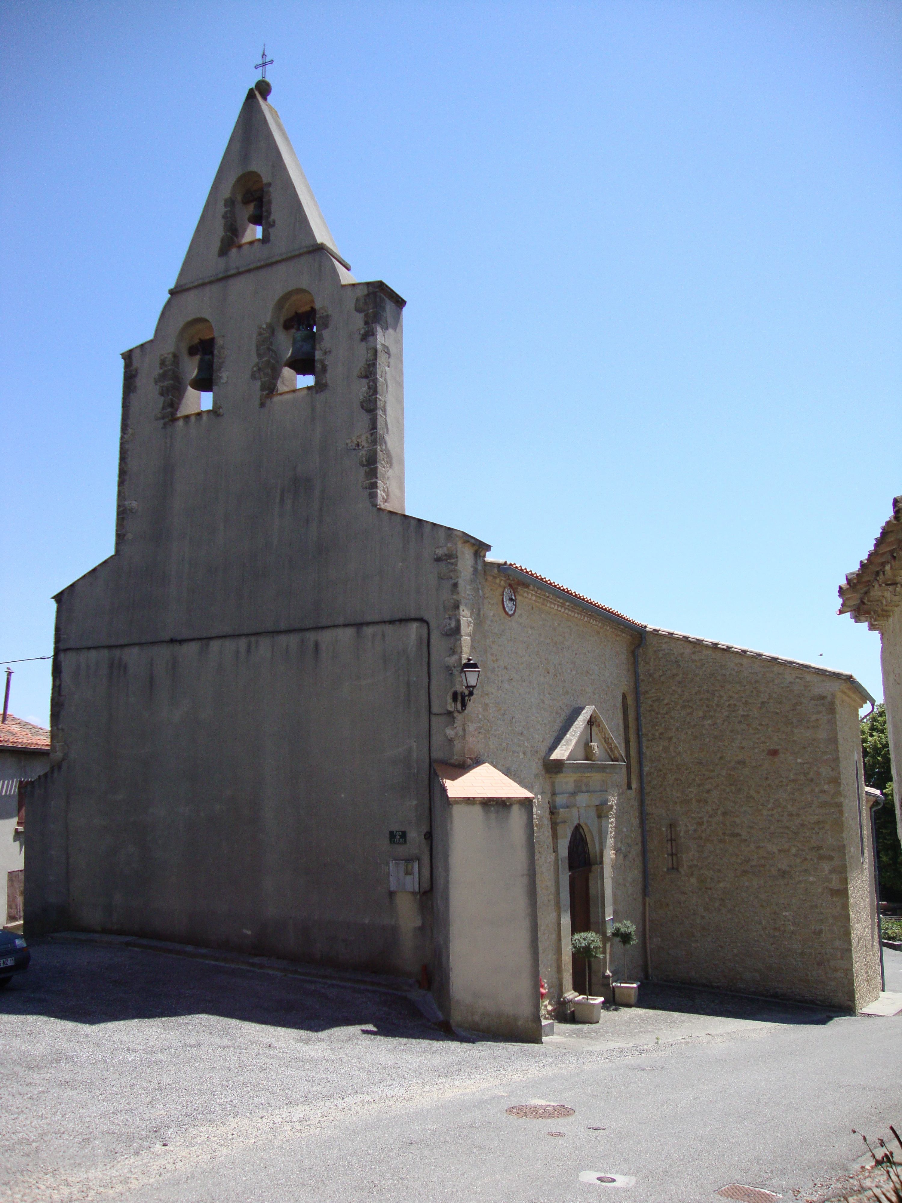 Saint-Paulet (Aude, Fr) église